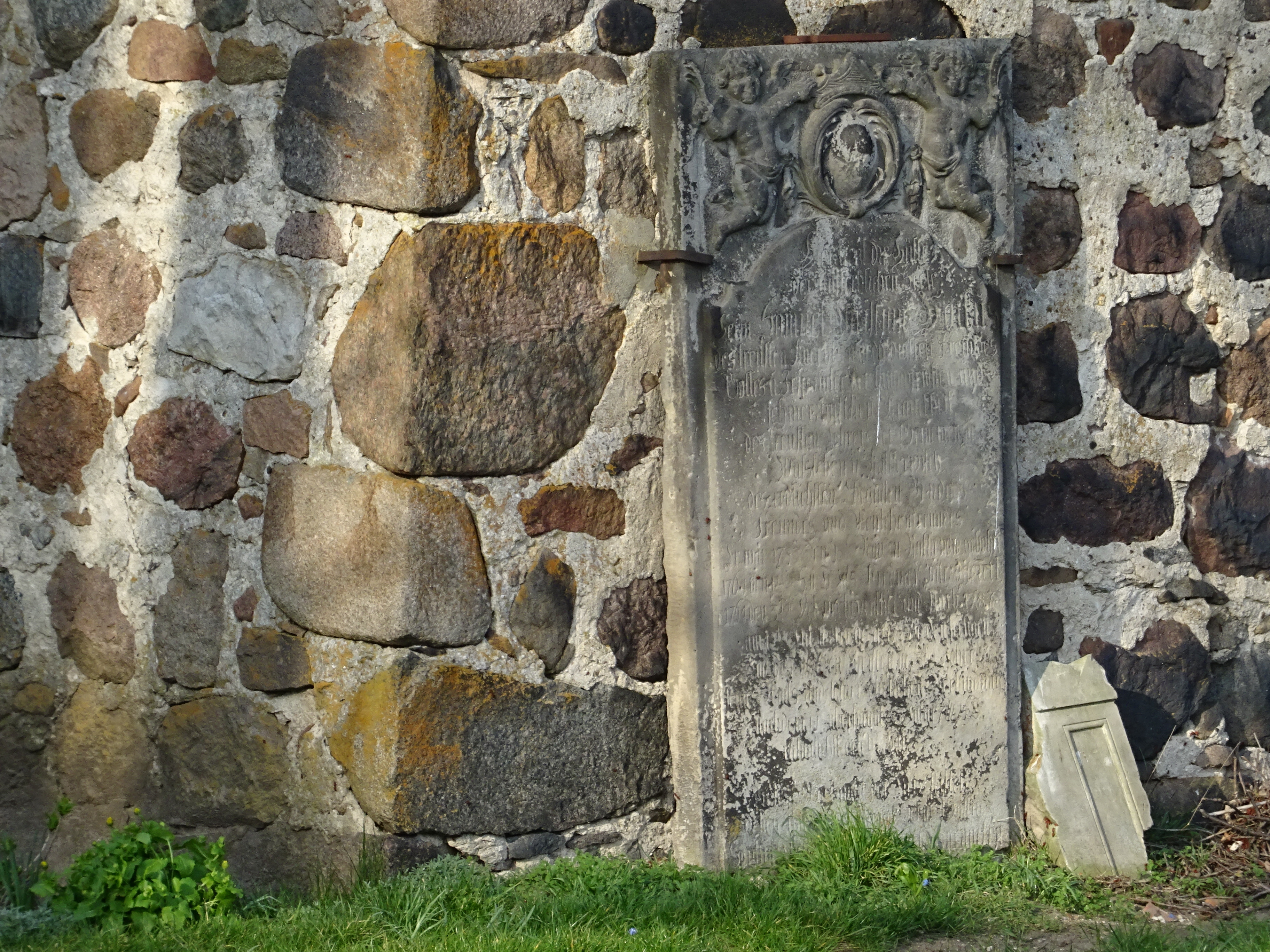 Walsleben, Ortsteil von Osterburg (Altmark), Kirche, alter Grabstein an der Kirchmauer